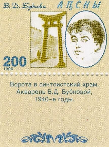 Varvara Bubnova